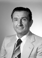 politico e scrittore italiano